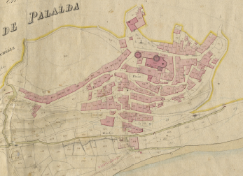 Palaldà en el Cadastre napoleònic del 1812 (Arxius Departamentals dels Pirineus Orientals)